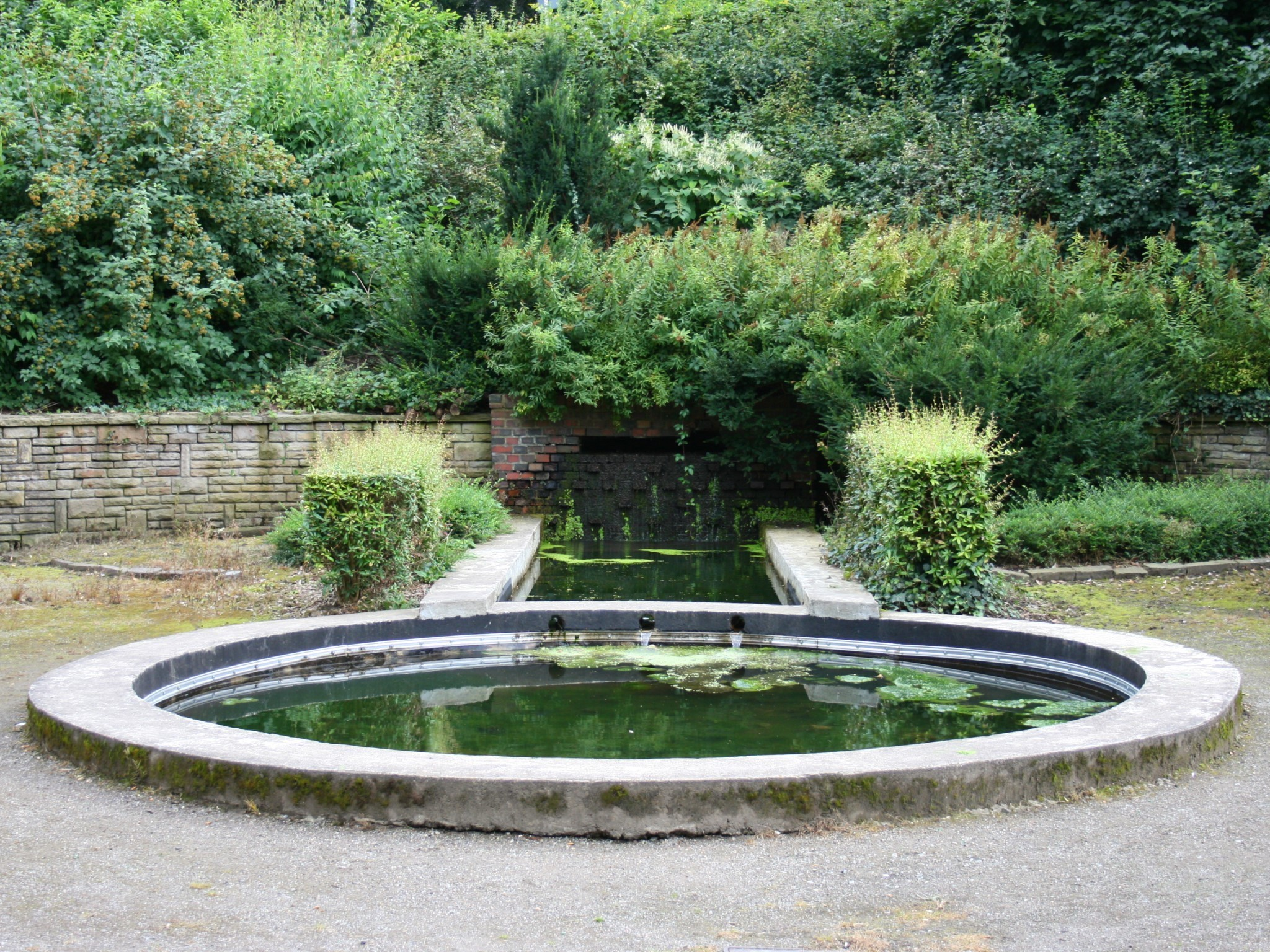 Brunnen in den Barmer Anlagen in Wuppertal-Barmen